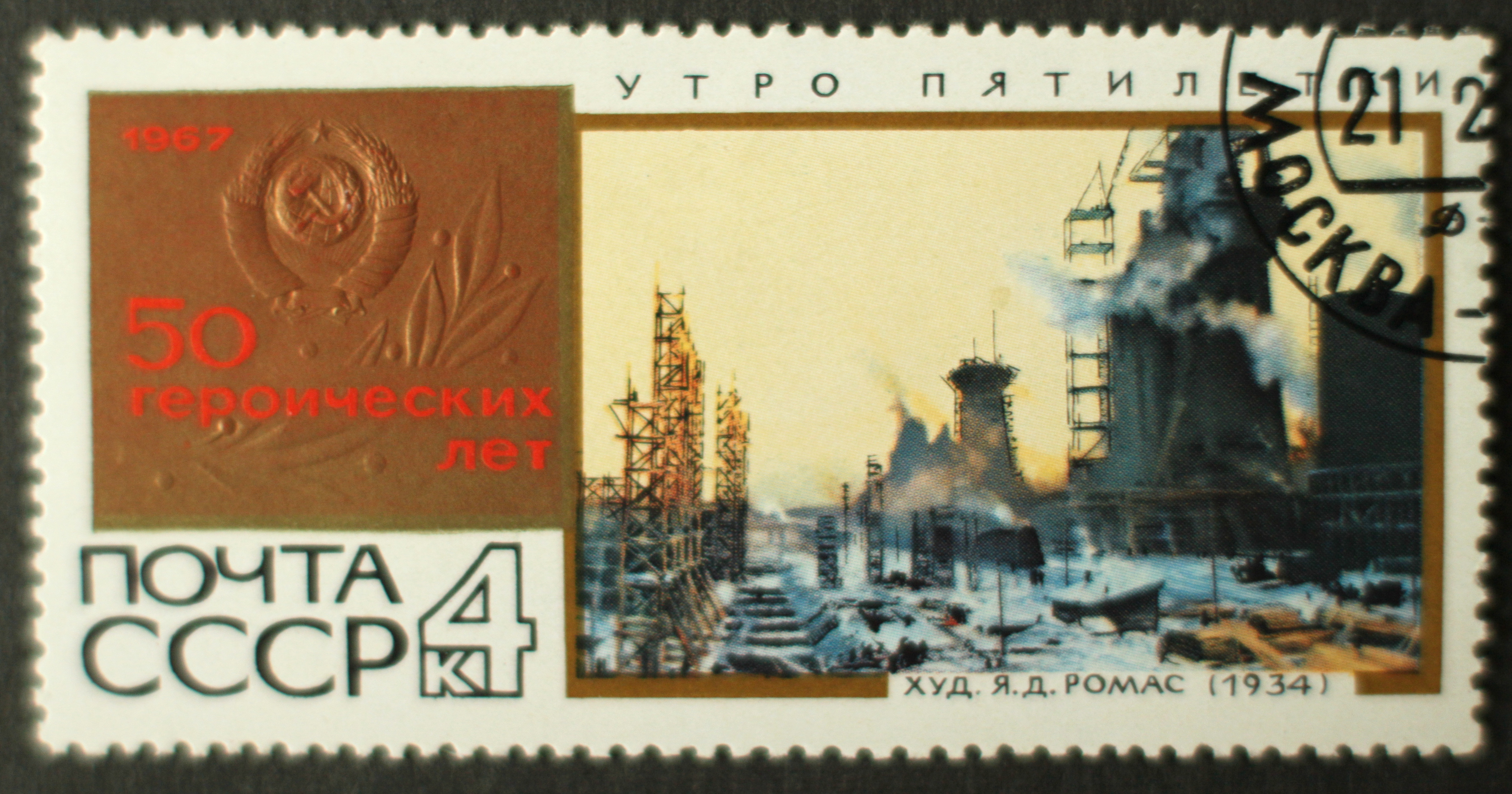 Briefmarke, Sowjetunion, 1967